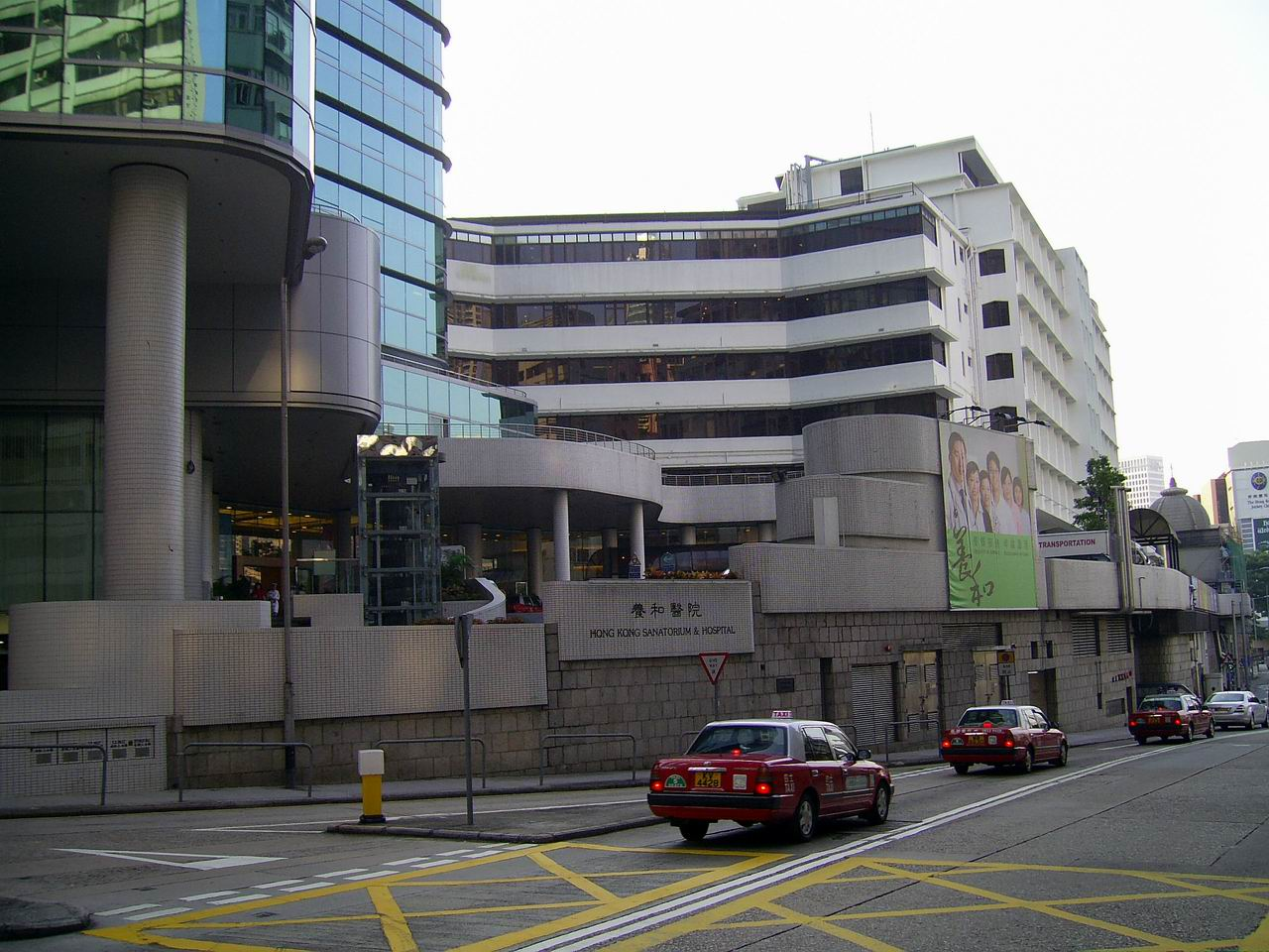 中文（香港）: 養和醫院